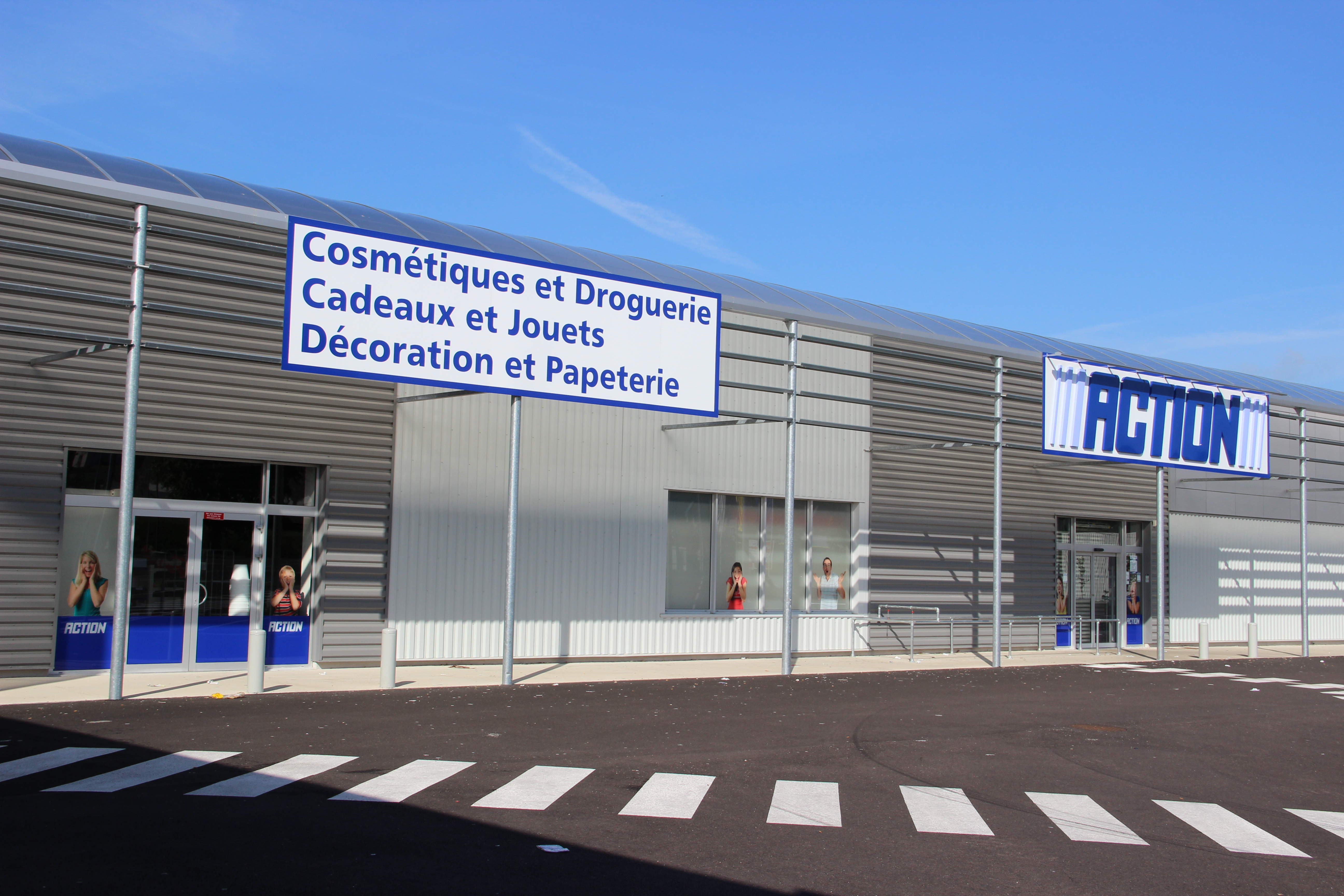 Magasin Action de Bar-le-Duc (ZAC Oudinot)